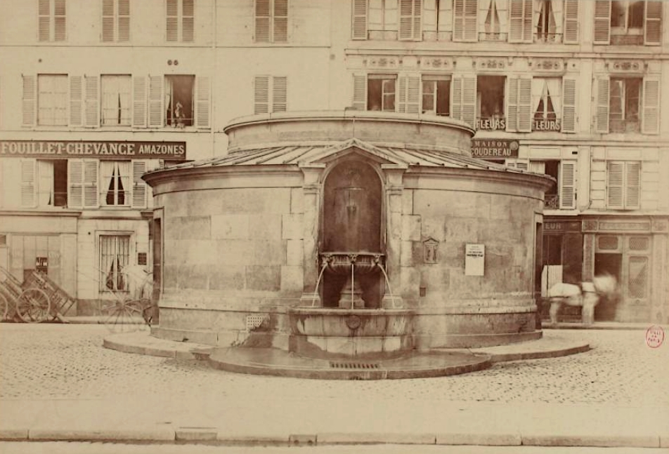 La fontaine du Marché-Saint-Honoré vers 1877 (détruite en 1955). Place du Marché-Saint-Honoré, Paris (1er arrond.). Photographe Pierre Edmond, 1877. Musée Carnavalet, Paris. N° INV:PH18045